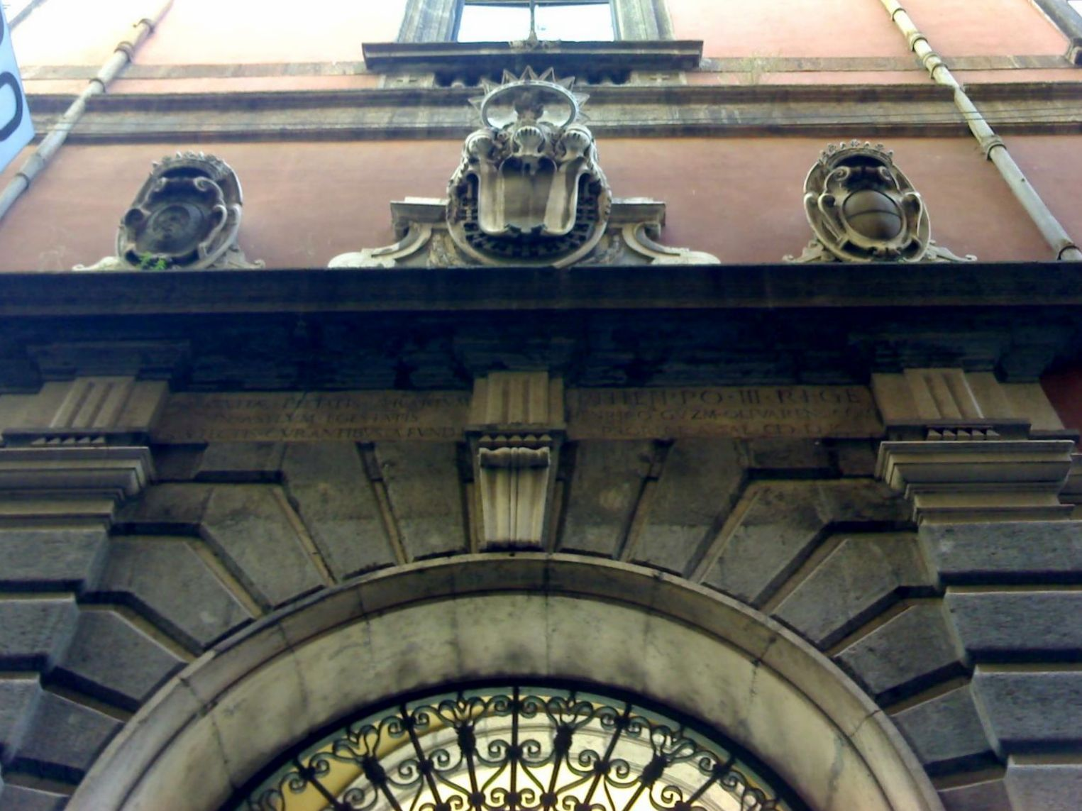 Stemma del palazzo del Monte di Pietà (Napoli)